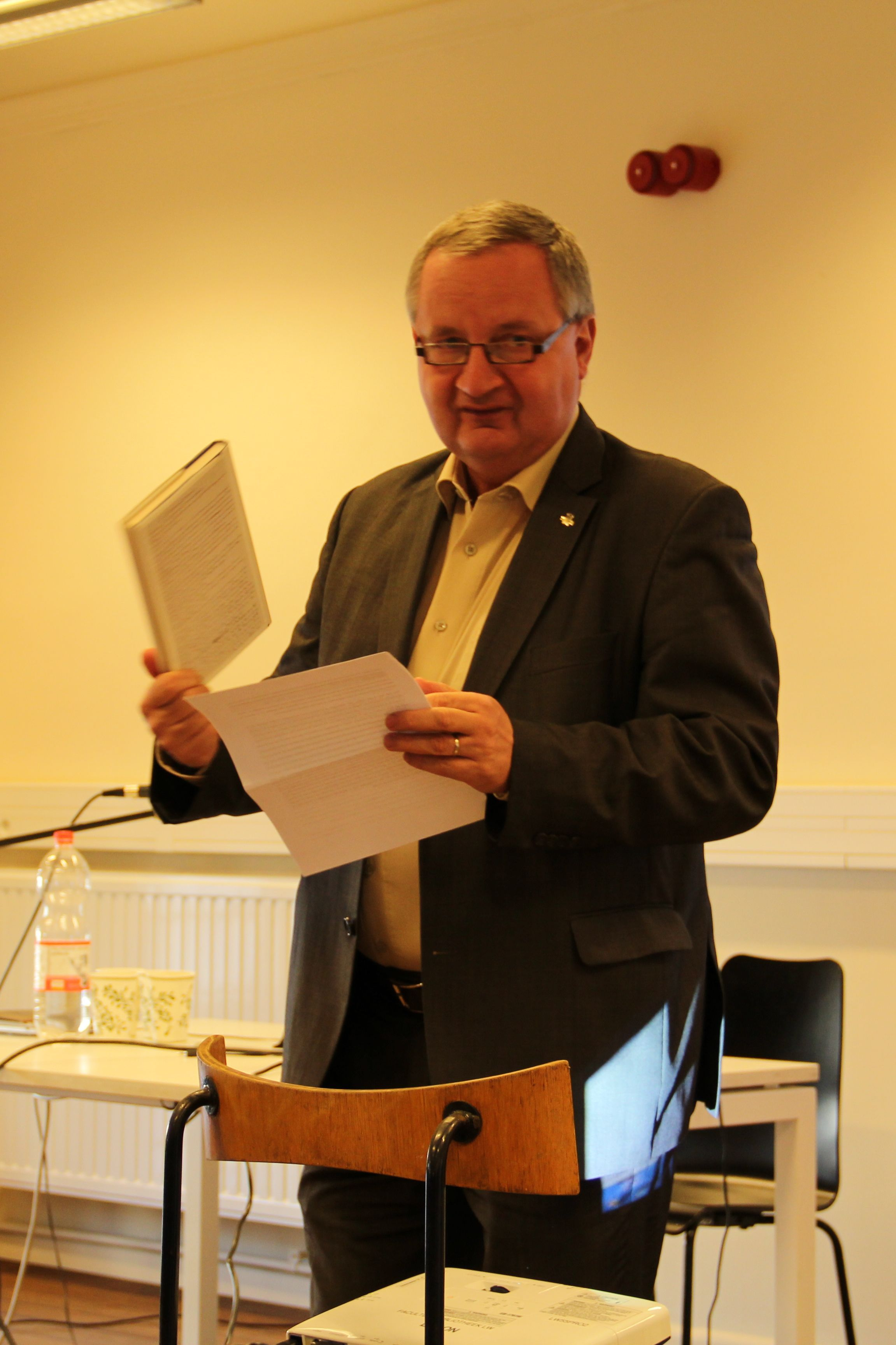 Voorleesmarathon 'De Groote Oorlog Voorgelezen' in de faculteitsbibliotheek Letteren en Wijsbegeerte op 13/11/2014 Foto door Sarah Posman.